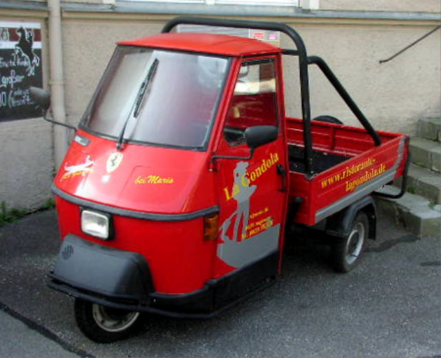 Piaggio Ape Delivery Van